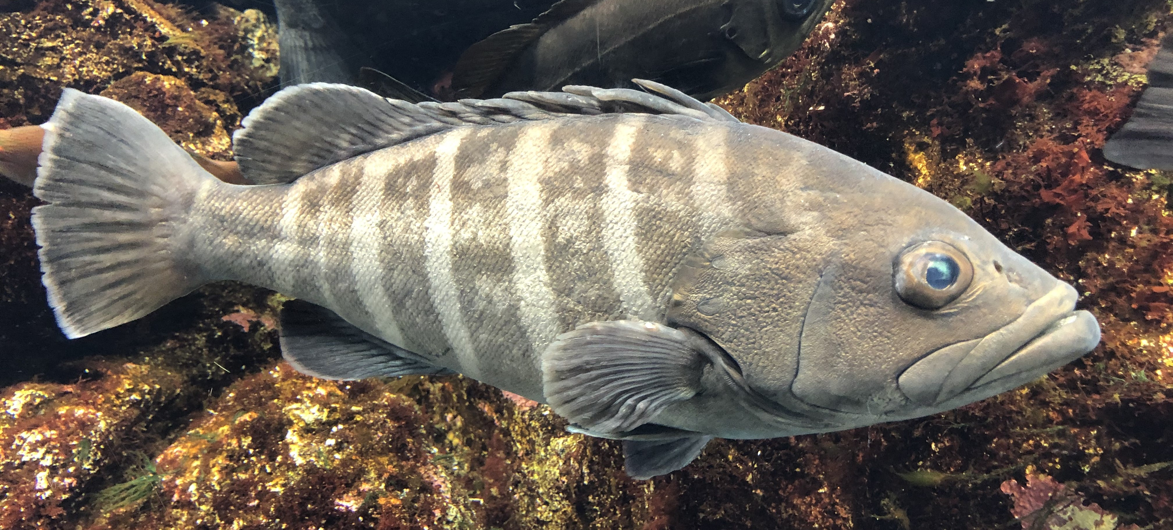 新江ノ島水族館のja:マハタ